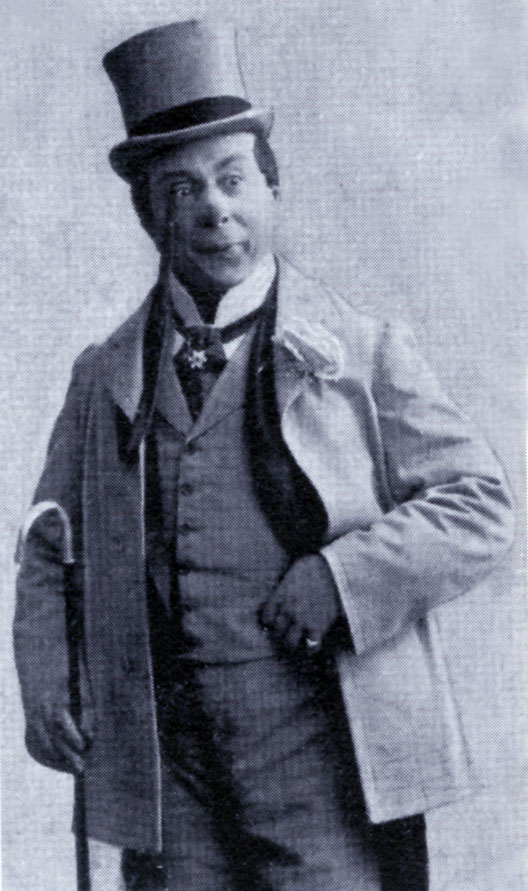 Nicola Maldacea